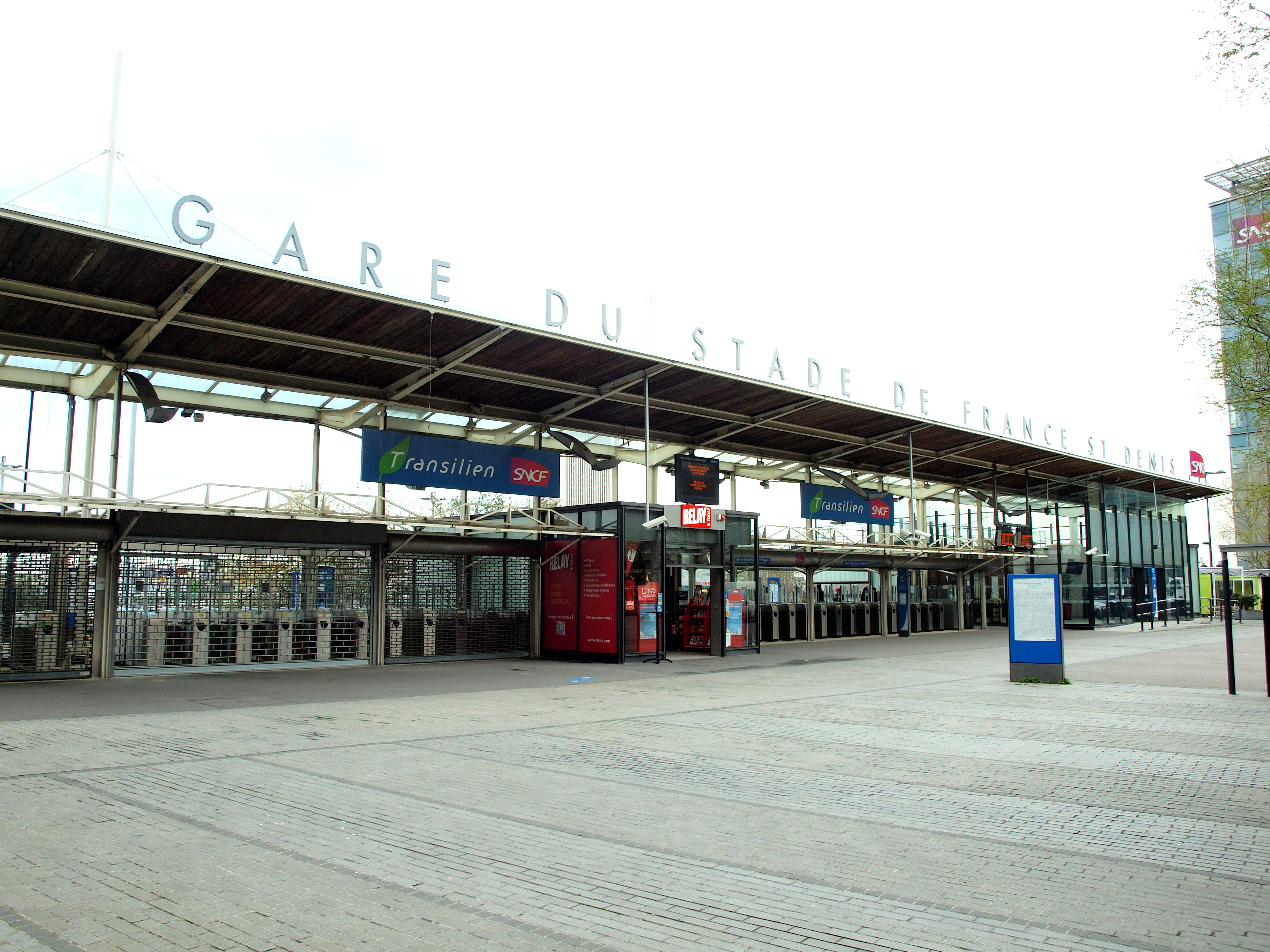 La Plaine-Saint-Denis (Seine-Saint-Denis, France), la gare du Stade de France & ses alentours.